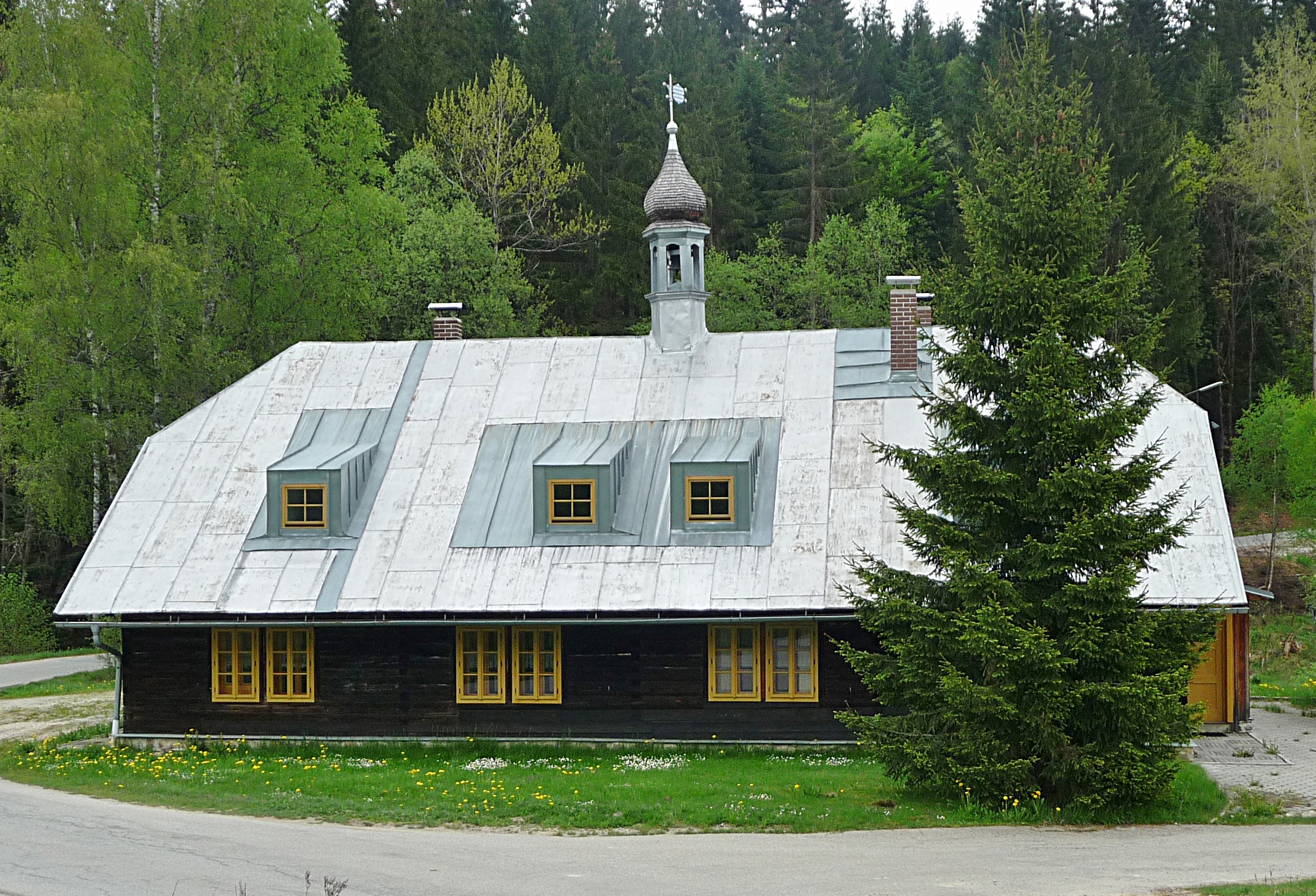 Das denkmalgeschützte Gebäude Seebachschleife 1 in Seebachschleife/Bayerisch Eisenstein